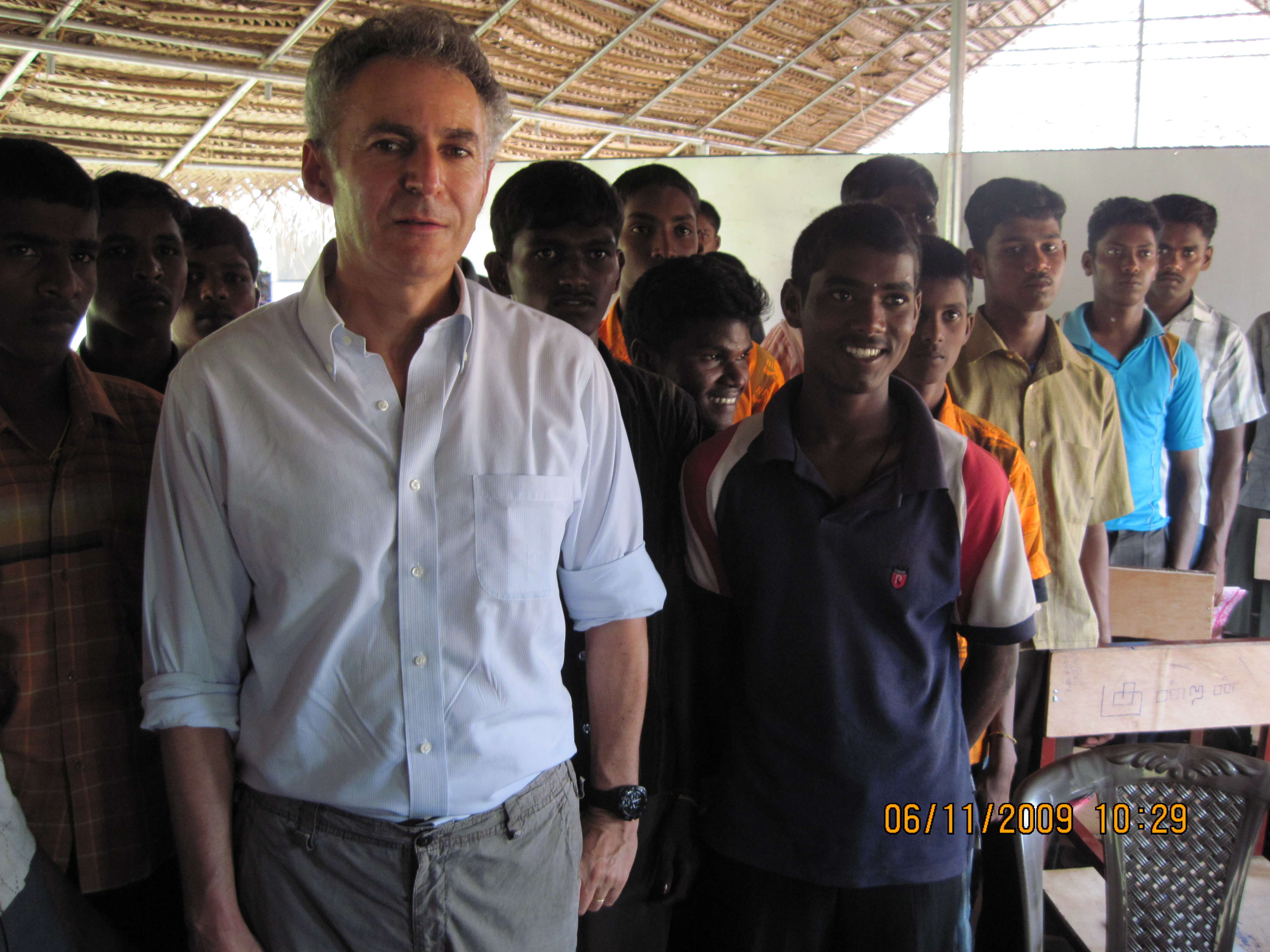 "Visite d'un centre pour la réinsertion des enfants soldats, Sri Lanka, Novembre 2009."